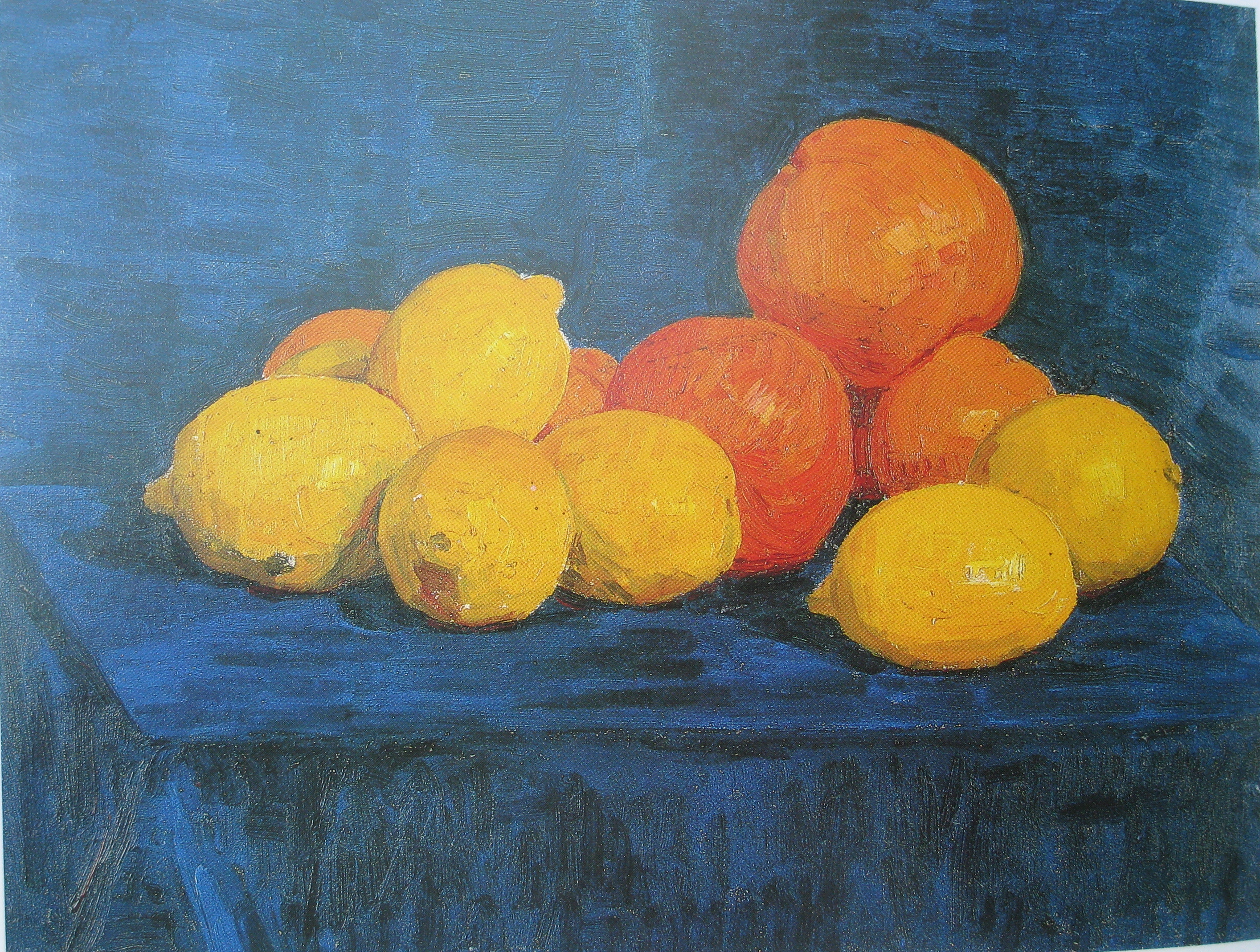 1912, Öl auf Leinwand